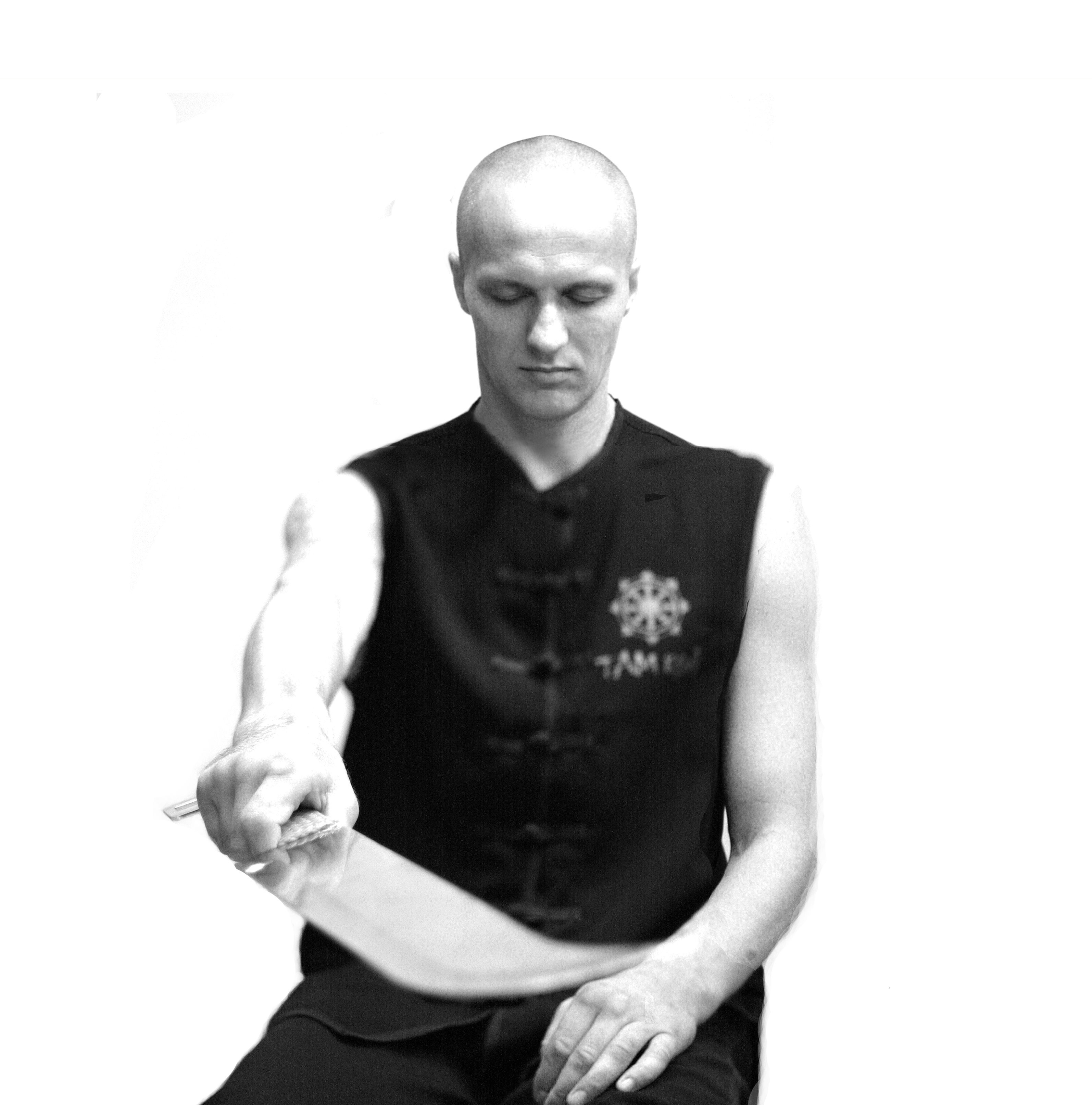 Короткий меч с загнутым кончиком - традиционное оружие Там Куи